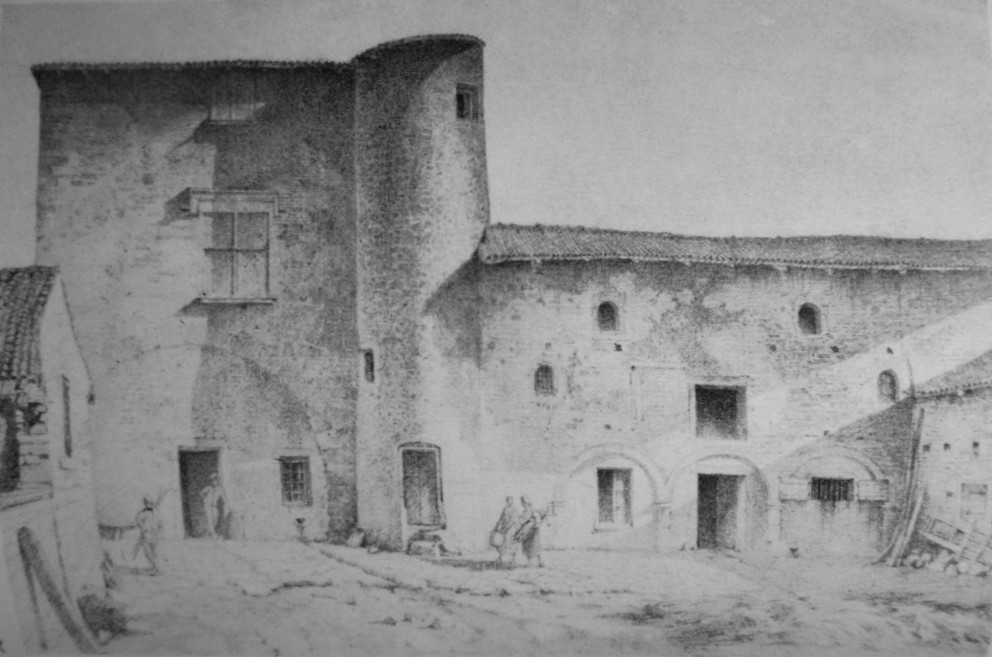 Schloss Anserweiler (Ancerville) im Département Moselle